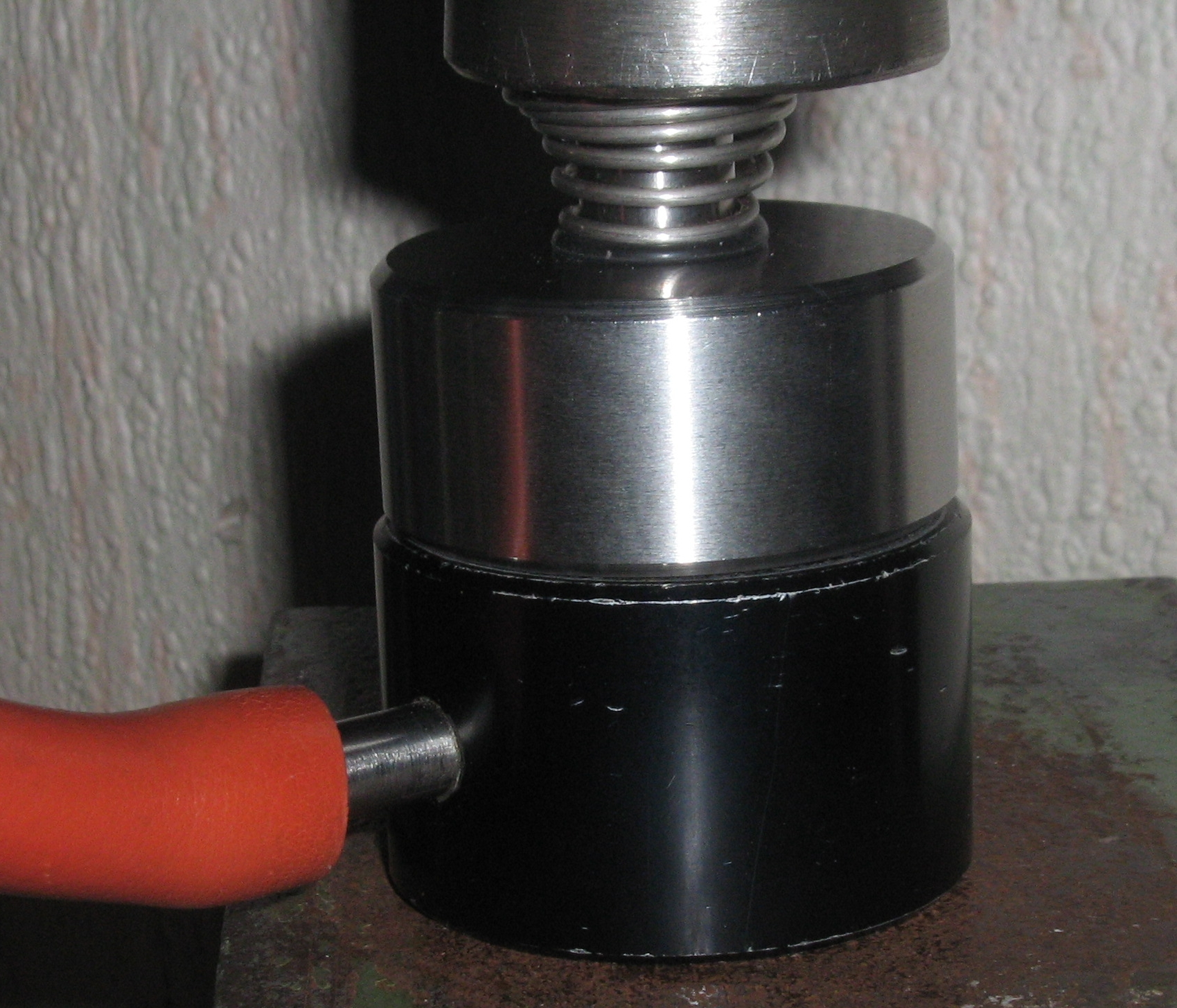 Presswerkzeug zur Herstellung von Kaliumbromid-Tabletten für die Infrarotspektroskopie